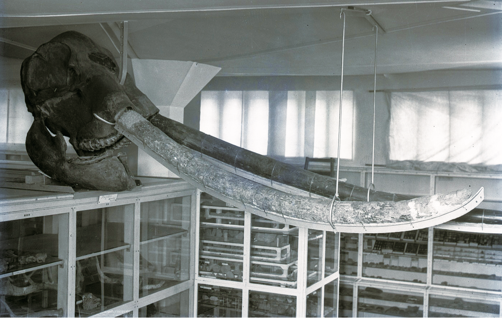 中文（中国大陆）: 北疆博物院的古生物化石陈列